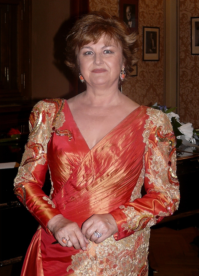 Edita Gruberová v Rudolfinu po svém recitálu v květnu 2008